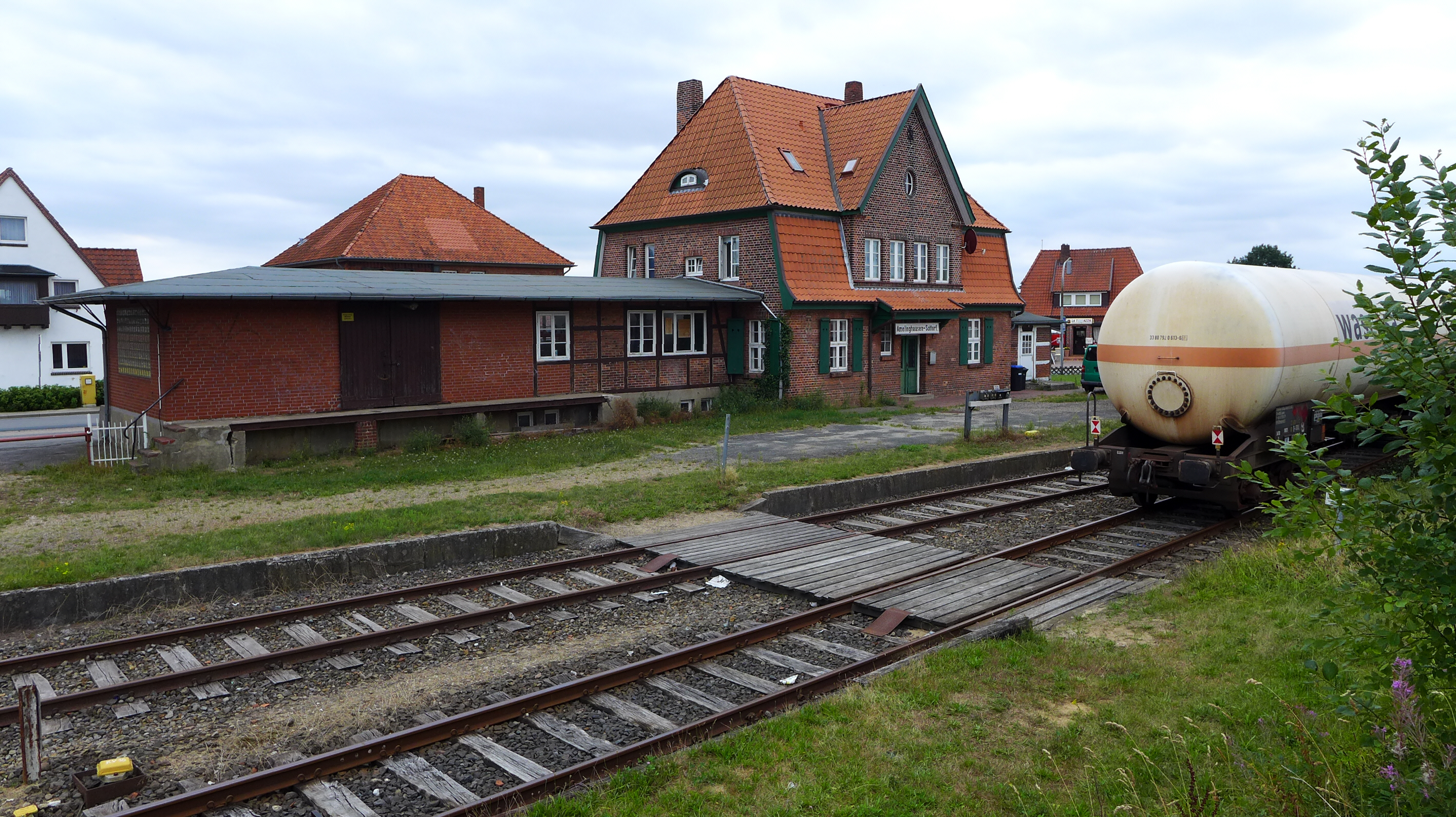 Weitgehend stillgelegter Bahnhof in Amelinghausen-Sottorf, Gelegenheitsnutzungen für Fracht- und Ausflugsverkehr.